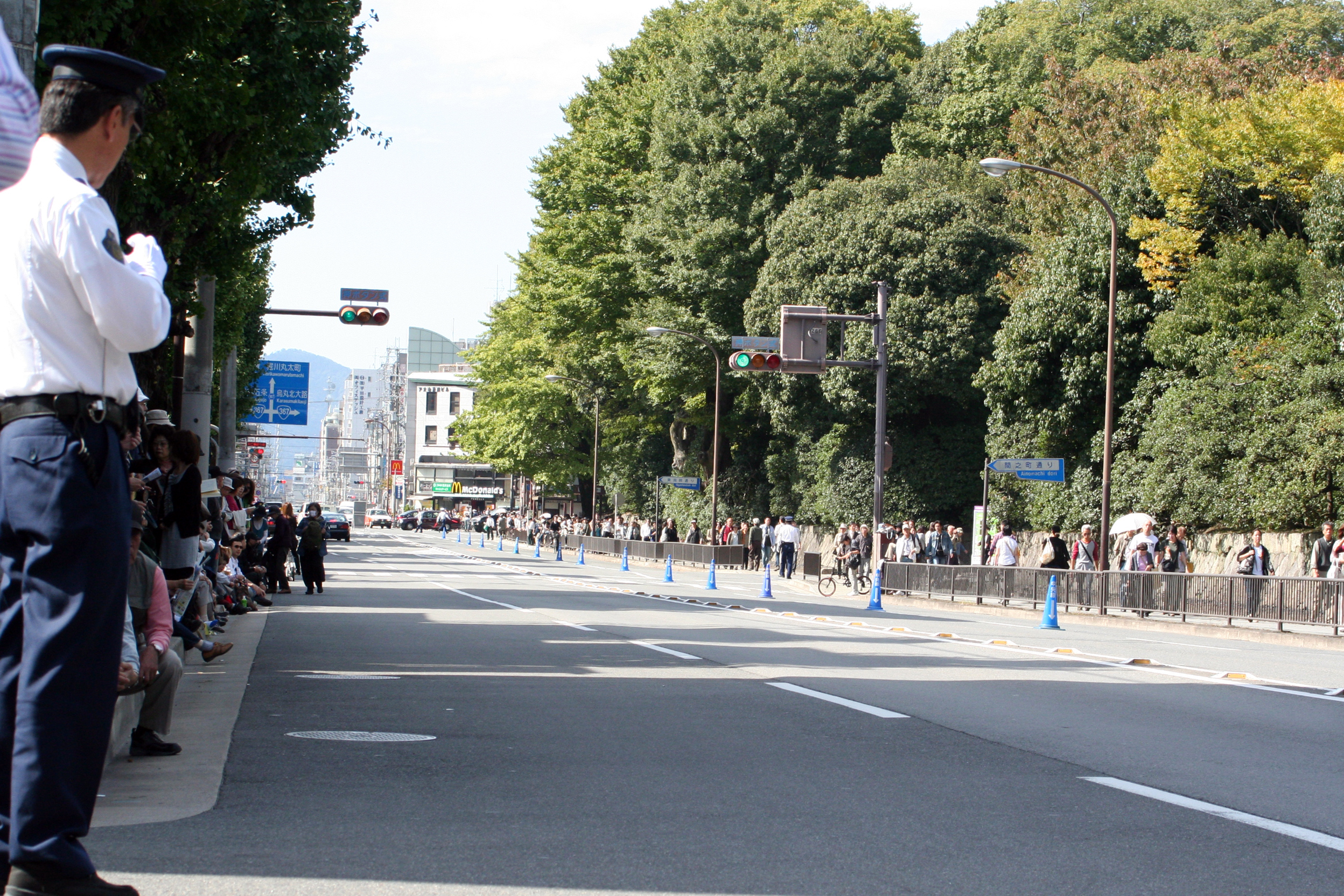 京都府京都市にて開催された時代祭。正午の御所から平安神宮までの行進の様子。2009年10月22日撮影。 丸太町通。堺町御門そばから西側を撮影。行列の行進が始まるとこの通りはバス以外の通行は不可能になる。